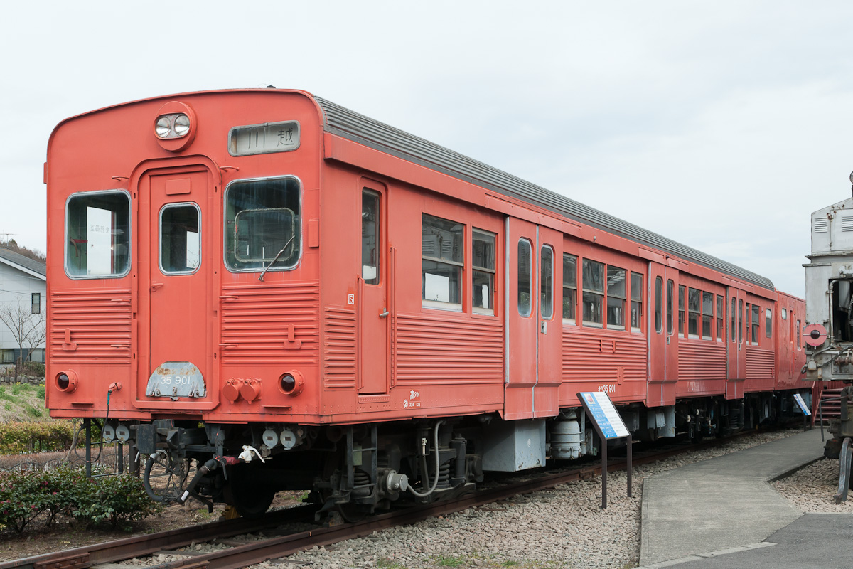 国鉄キハ35形気動車（キハ35 901）ステンレス試作車。碓氷鉄道文化村の保存車。